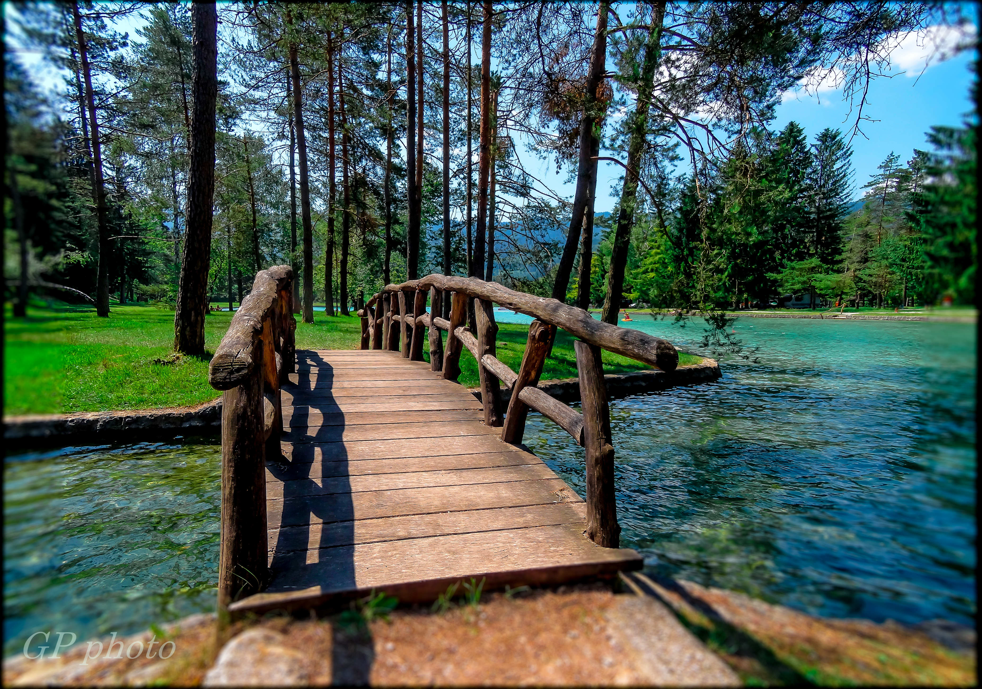 Šobec, Slovenia